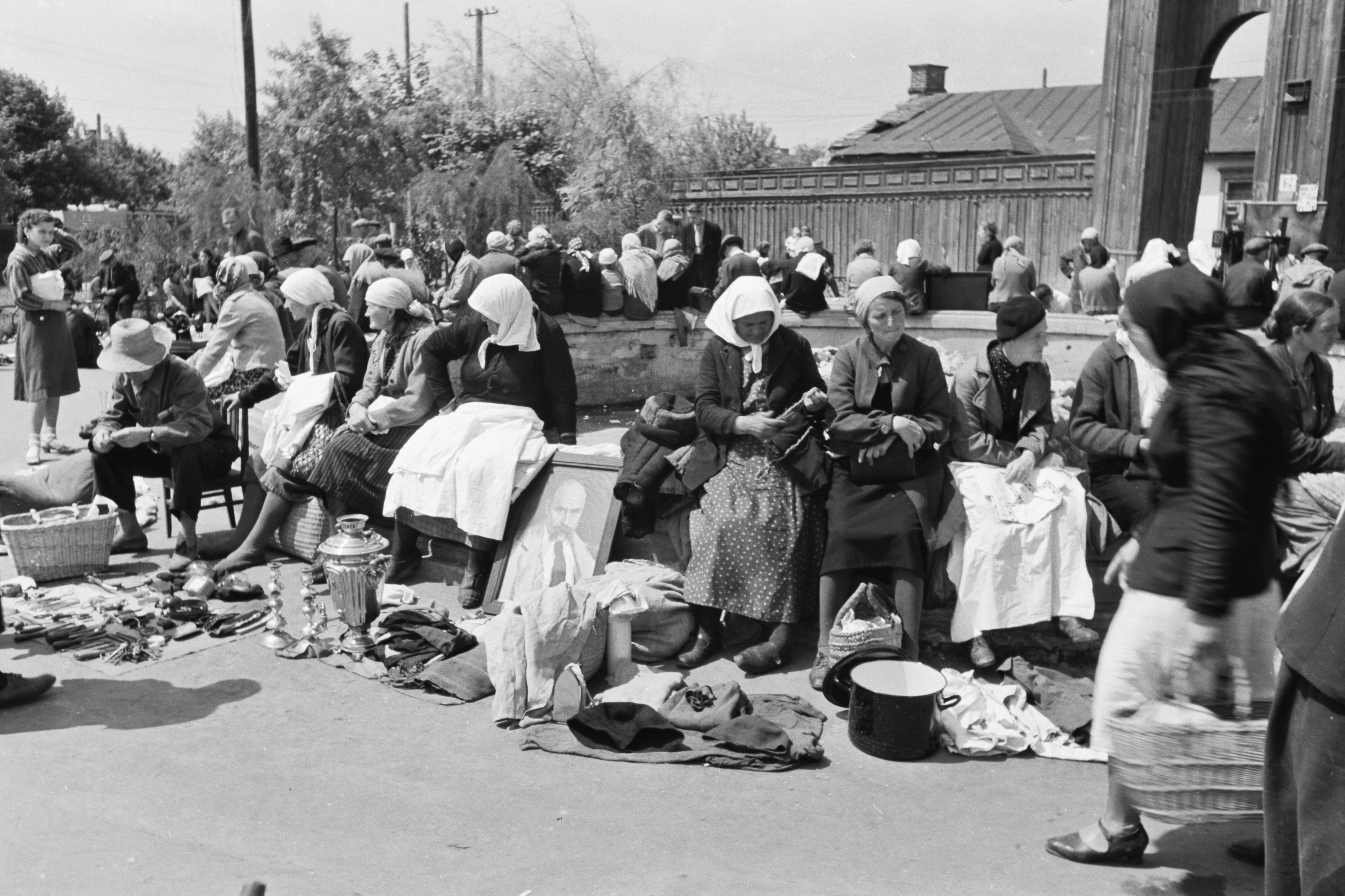 Győzelem tér (ekkor: 1905-ös felkelés tere), piac. Location: Ukraine, Kiev Tags: market, tea-urn Title: Győzelem tér (ekkor: 1905-ös felkelés tere), piac.